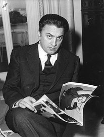 Fellini ontvangt de Academy award.